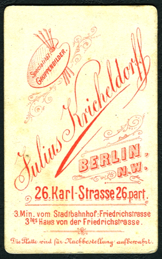 Rückseite der Carte de visite von Julius Kricheldorff, Berlin N.W., 26. Karl-Strasse 26 parterre, 3 Minuten vom Stadtbahnhof Friedrichstrasse, 3tes Haus von der Friedrichstrasse: "Specialität Gruppenbilder". Die Platte wurde "für Nachbestellungen aufbewahrt".